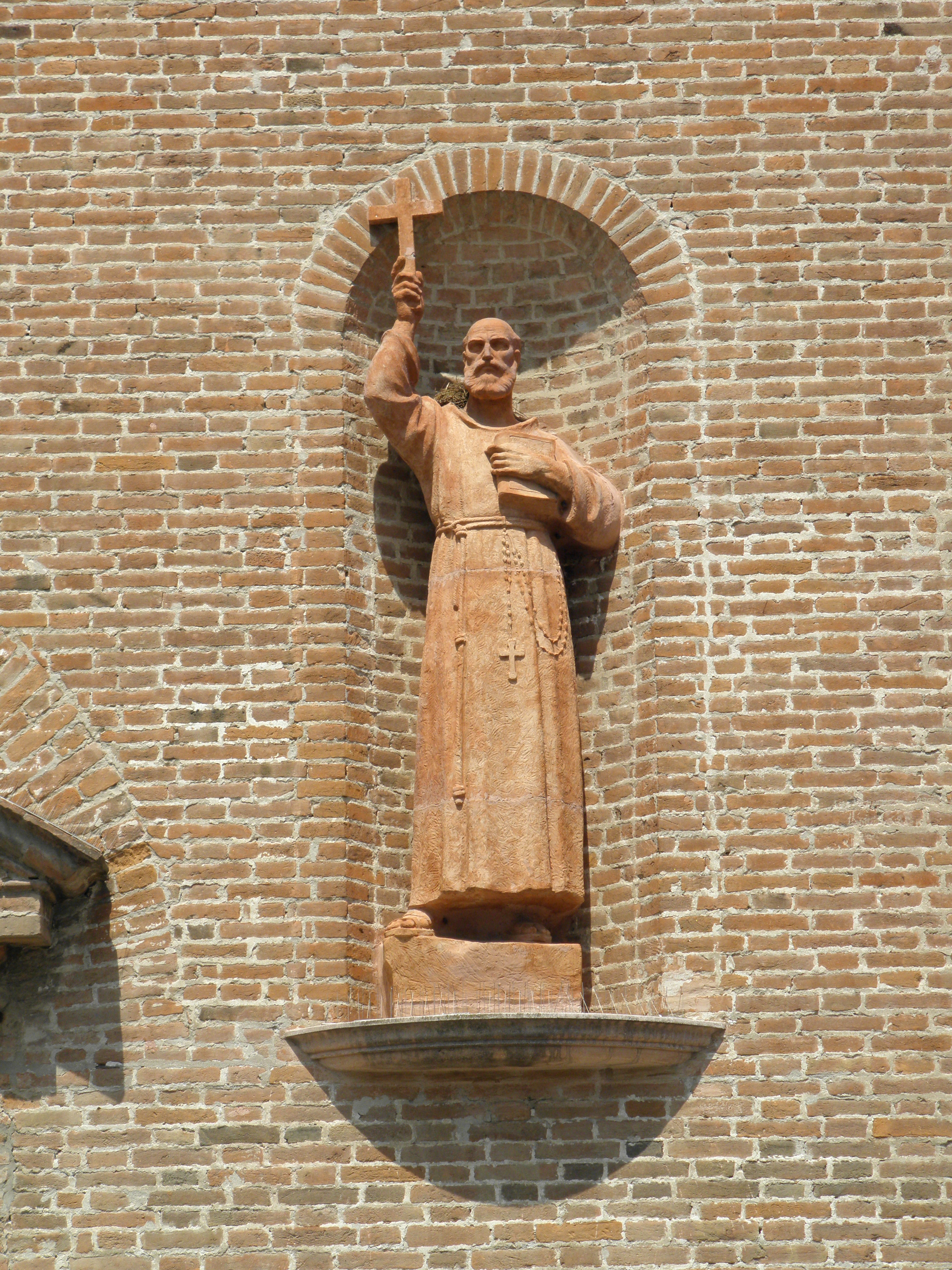 Rovigo: statua di San Lorenzo da Brindisi Superiore posta sulla nicchia di sinistra dell'omonima chiesa facente parte del complesso del Convento e Seminario dei Frati Minori Cappuccini.